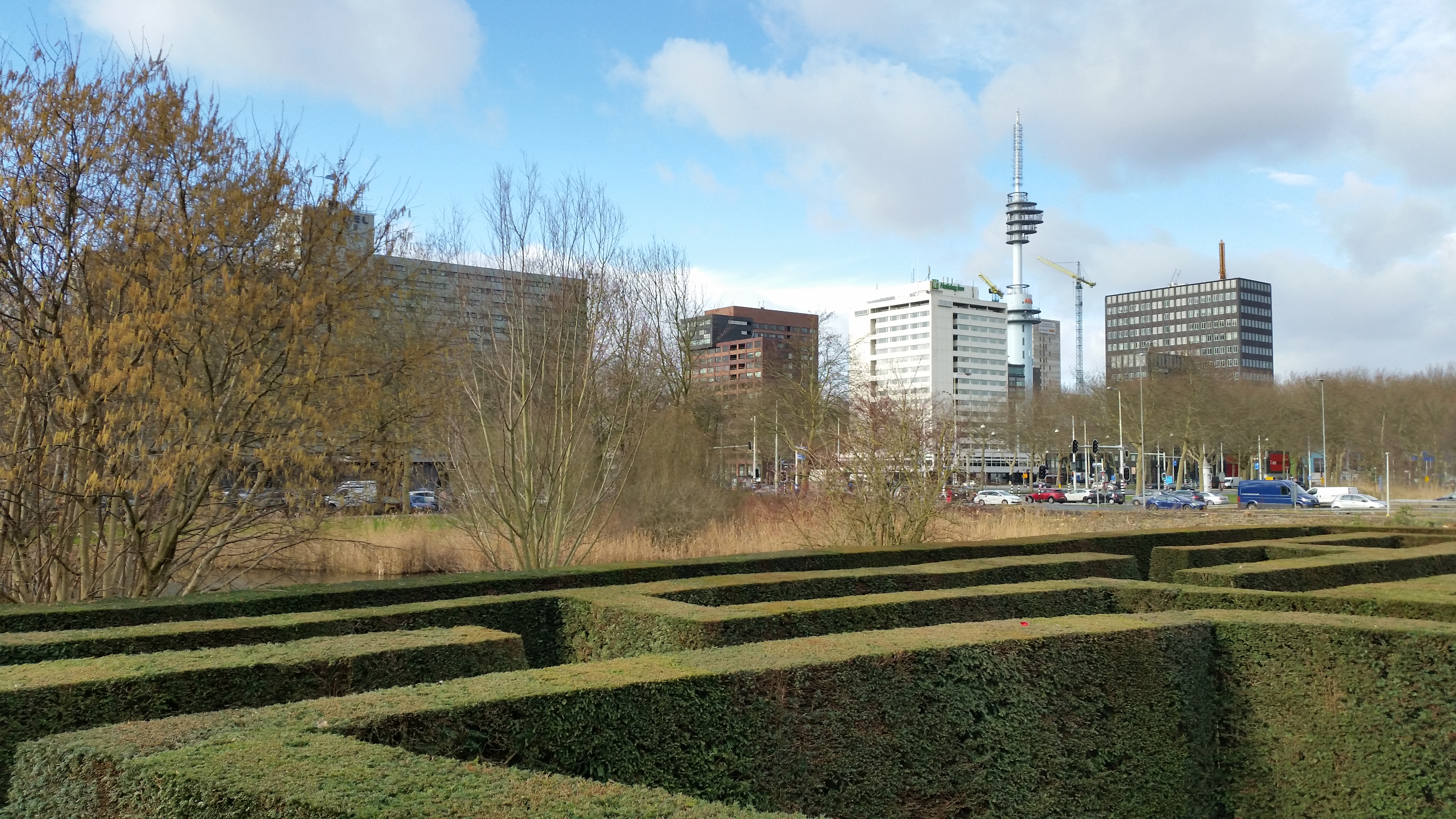 Doolhof in het Amstelpark met op de achtergrond het witte gebouw van Holdiay Inn; links het grijze gebouw van Novotel